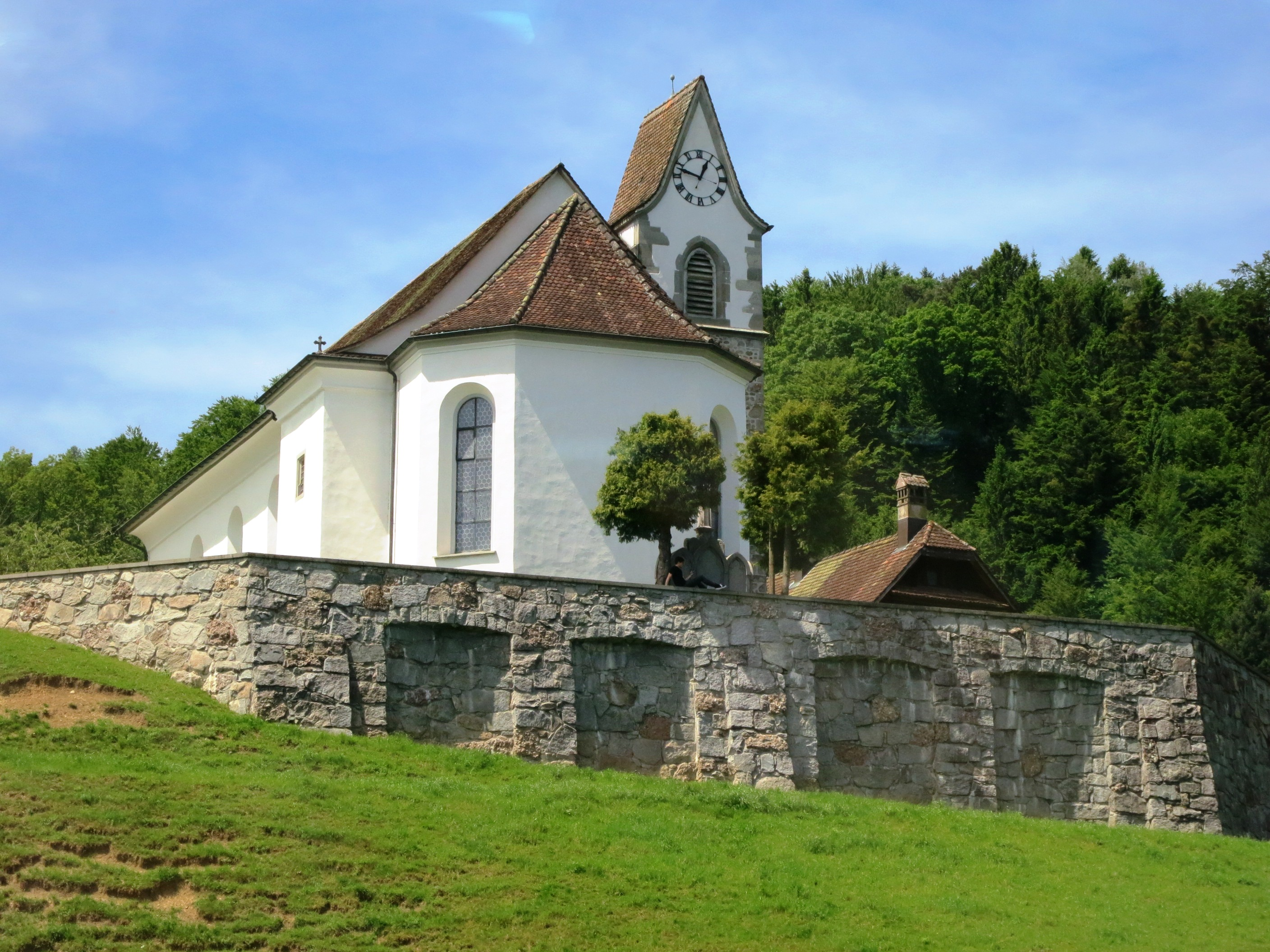 Kirche Risch ZG, Schweiz